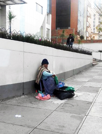 Venta callejera de Coca en la zona de Calacoto, La Paz Bolivia